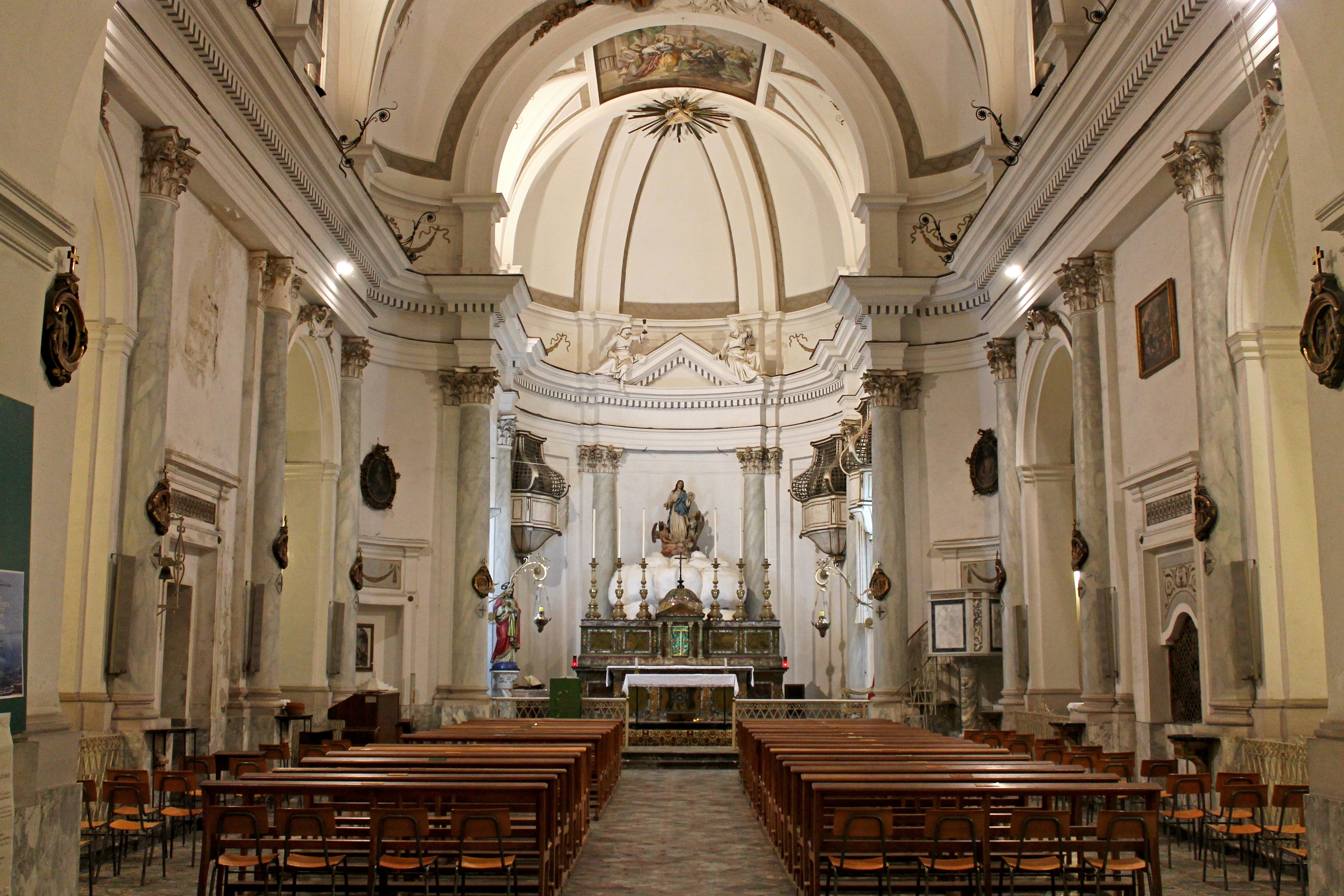 La chiesa dedicata alla S.S. Trinità e San Marziano sorge sulle rovine del cinquecentesco palazzo La Palumba. Costruita dopo il terremoto del 1693, la sua struttura si presenta a torretta, svettante verso l'alto: dalle sue terrazze e possibile ammirare paesaggi mozzafiato. Al suo interno custodisce opere di grande fattura, fra cui un bellissimo affresco di Sebastiano Lo Monaco nella volta della navata. Il pavimento è interamente ricoperta di ceramica di Caltagirone del XVIII secolo. Troviamo diverse tele, fra cui una crocifissione di Giuseppe Velasco e una pala raffigurante Sant'Antonio, del XIV sec, circa. La chiesa fa parte del gruppo dei monumenti nazionali.